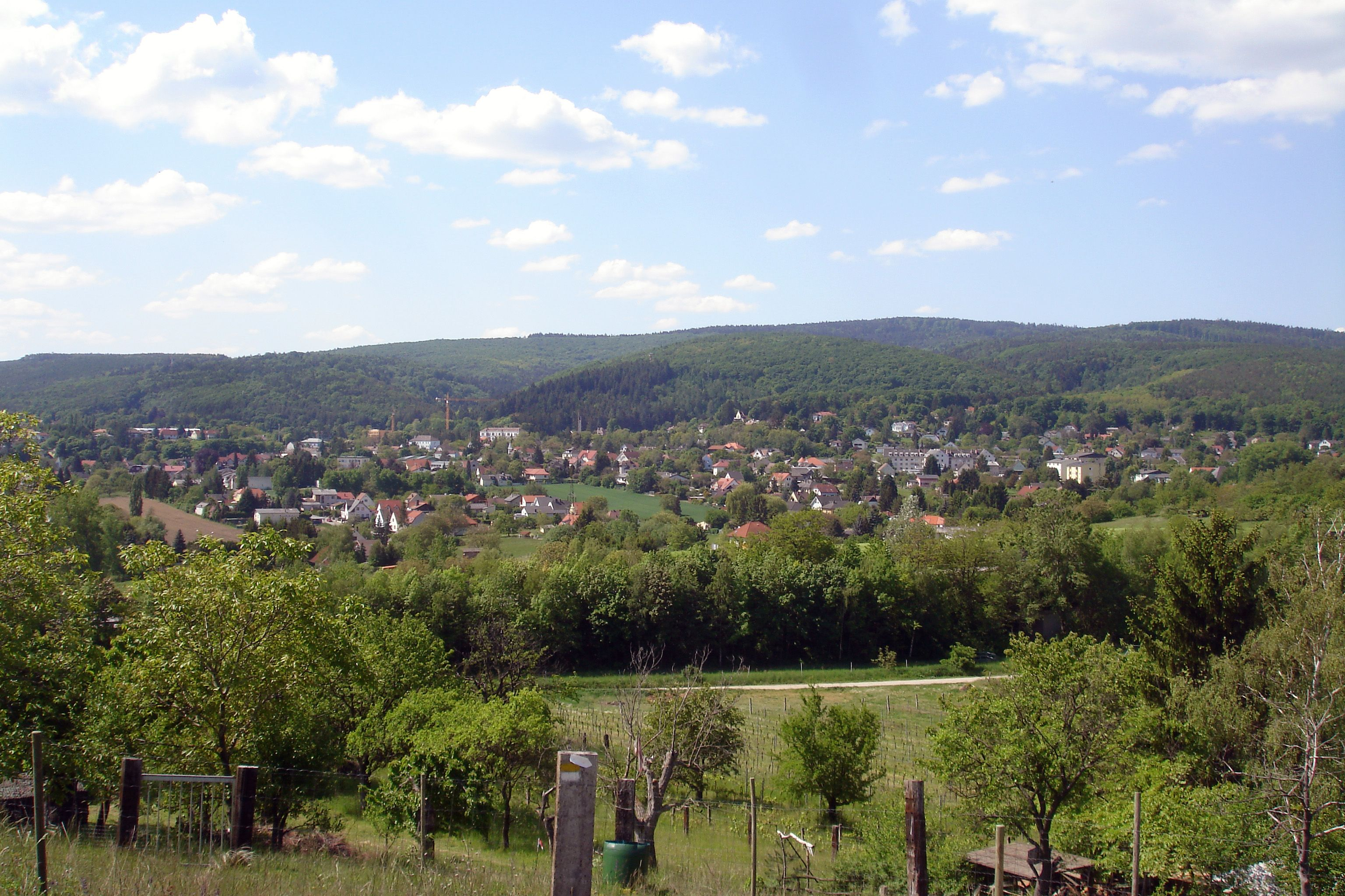 Bad Sauerbrunn vom Keltenberg aus gesehen